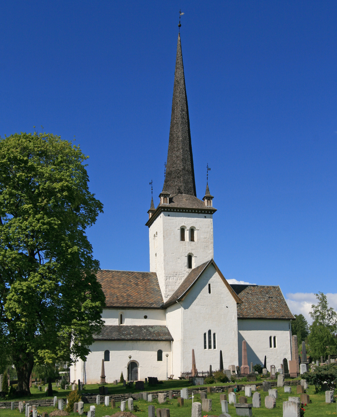 Ringsaker kirke